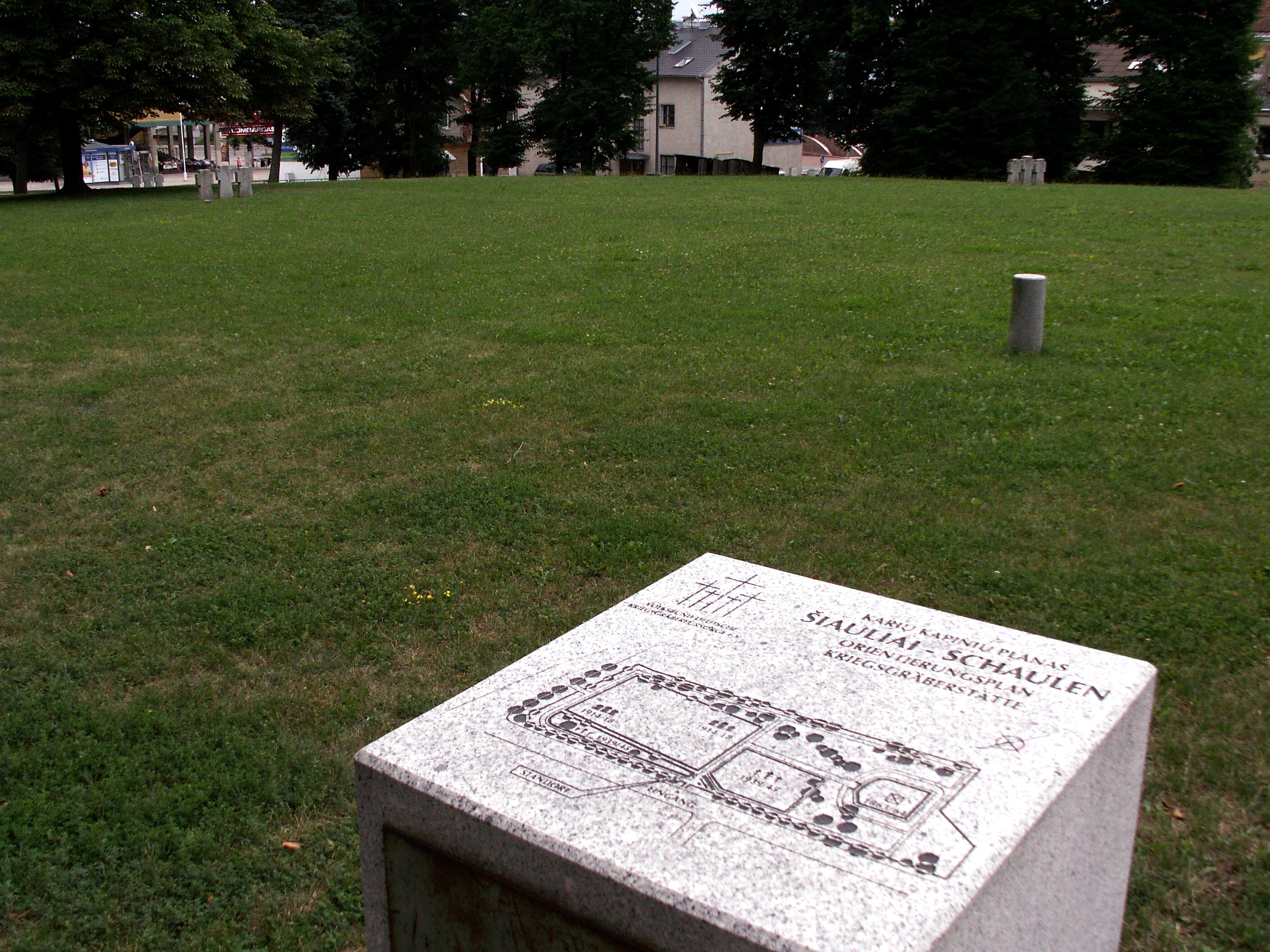 Kriegsgräberstätte Sukilėlių kalnelis, Šiauliai